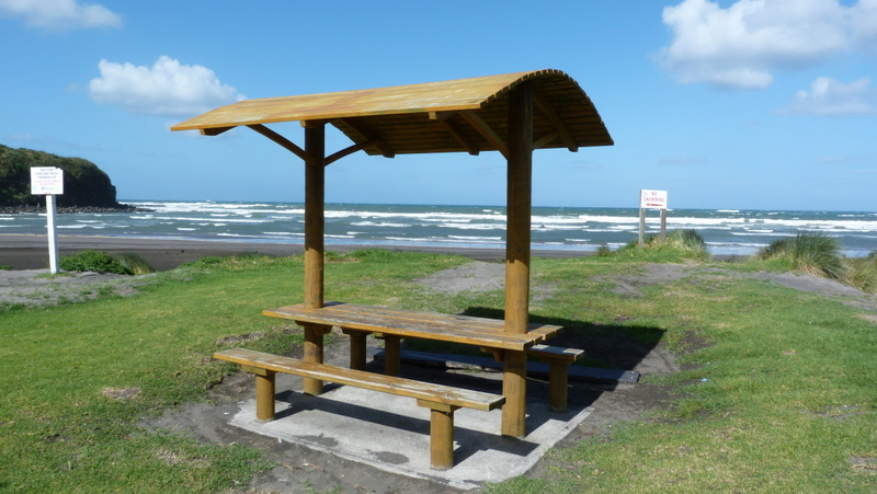 Opunake Beach